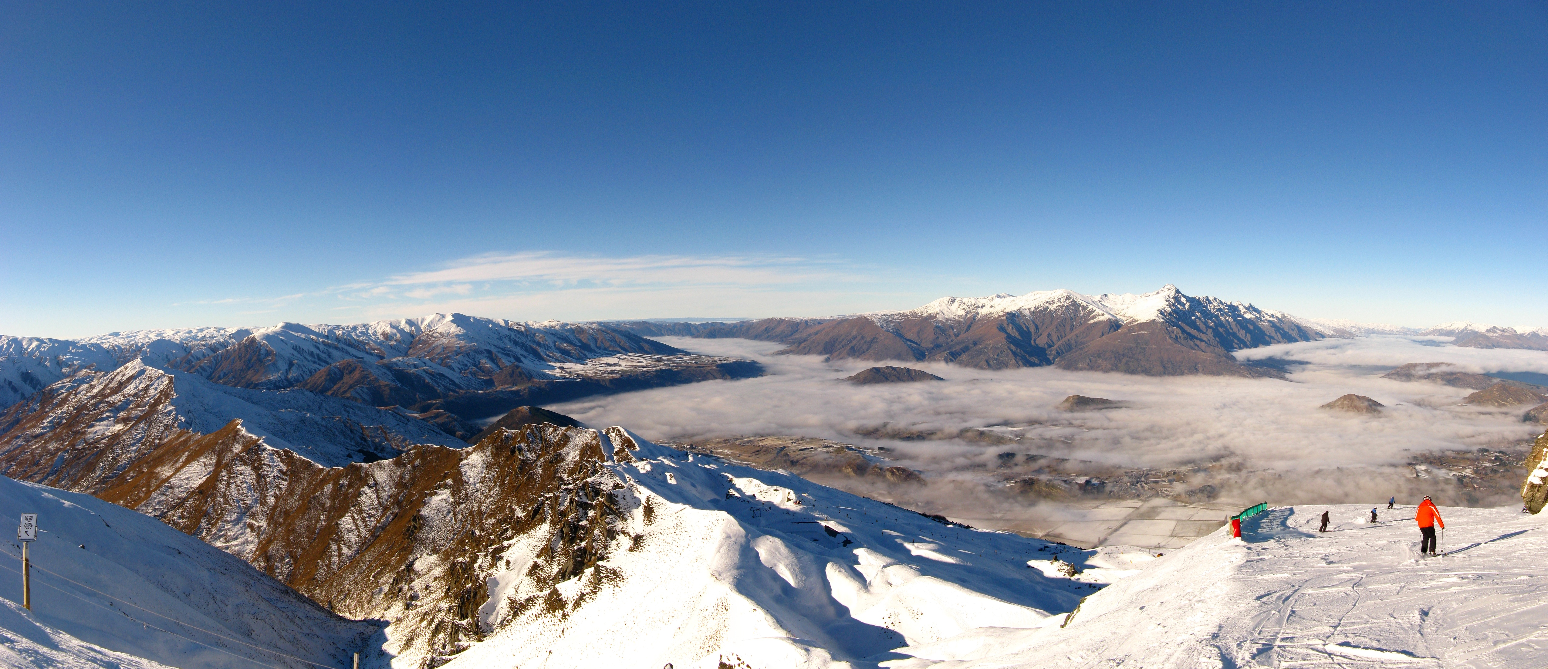 Coronet Peak Ski Fields